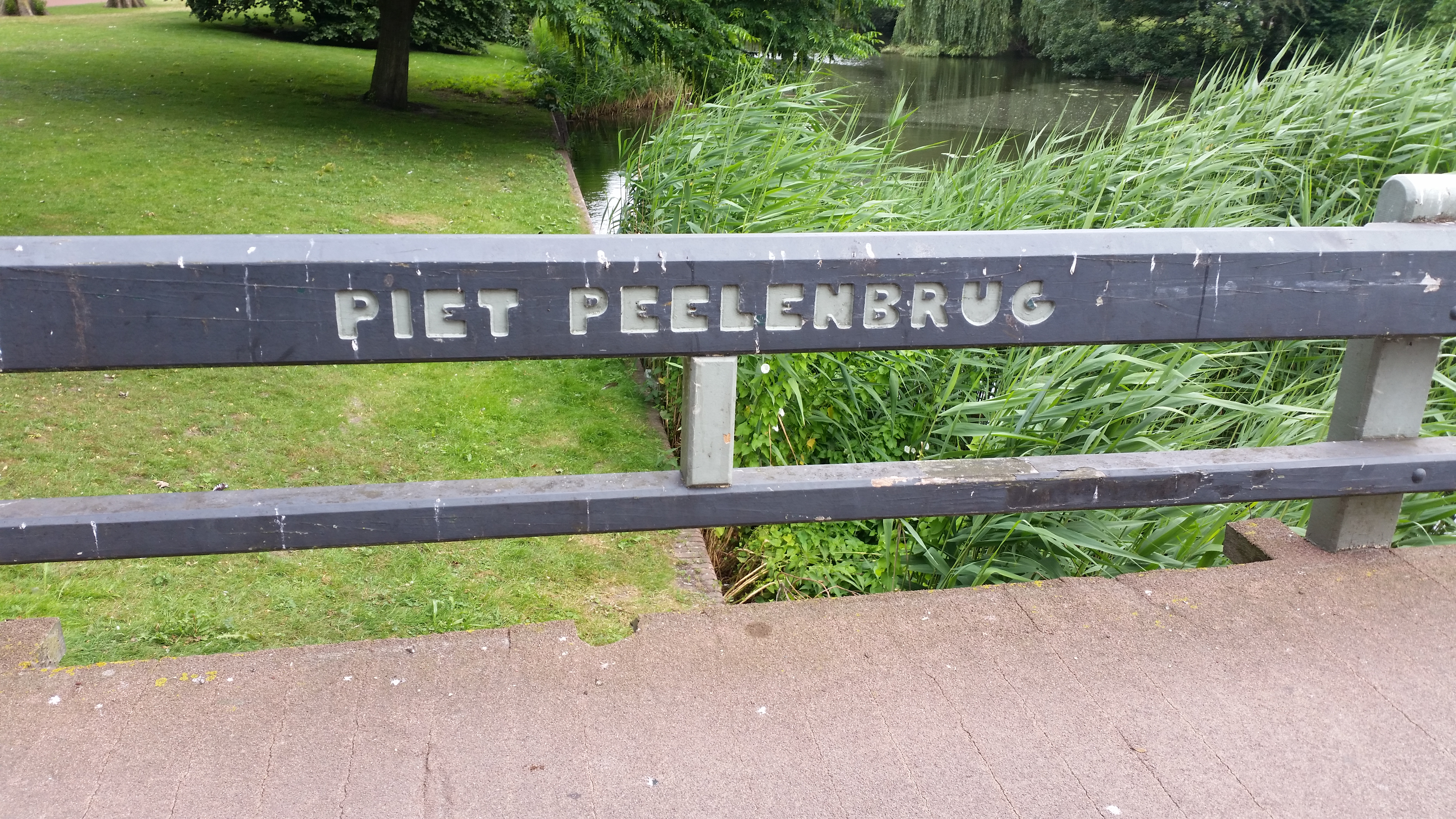 Brug 786, Piet Peelenbrug, leuning en naamplaat